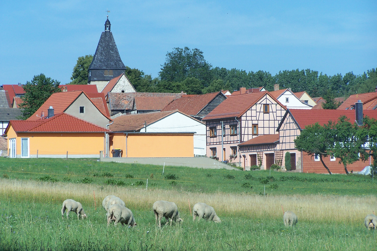 Blick von Osten in Richtung Craula.